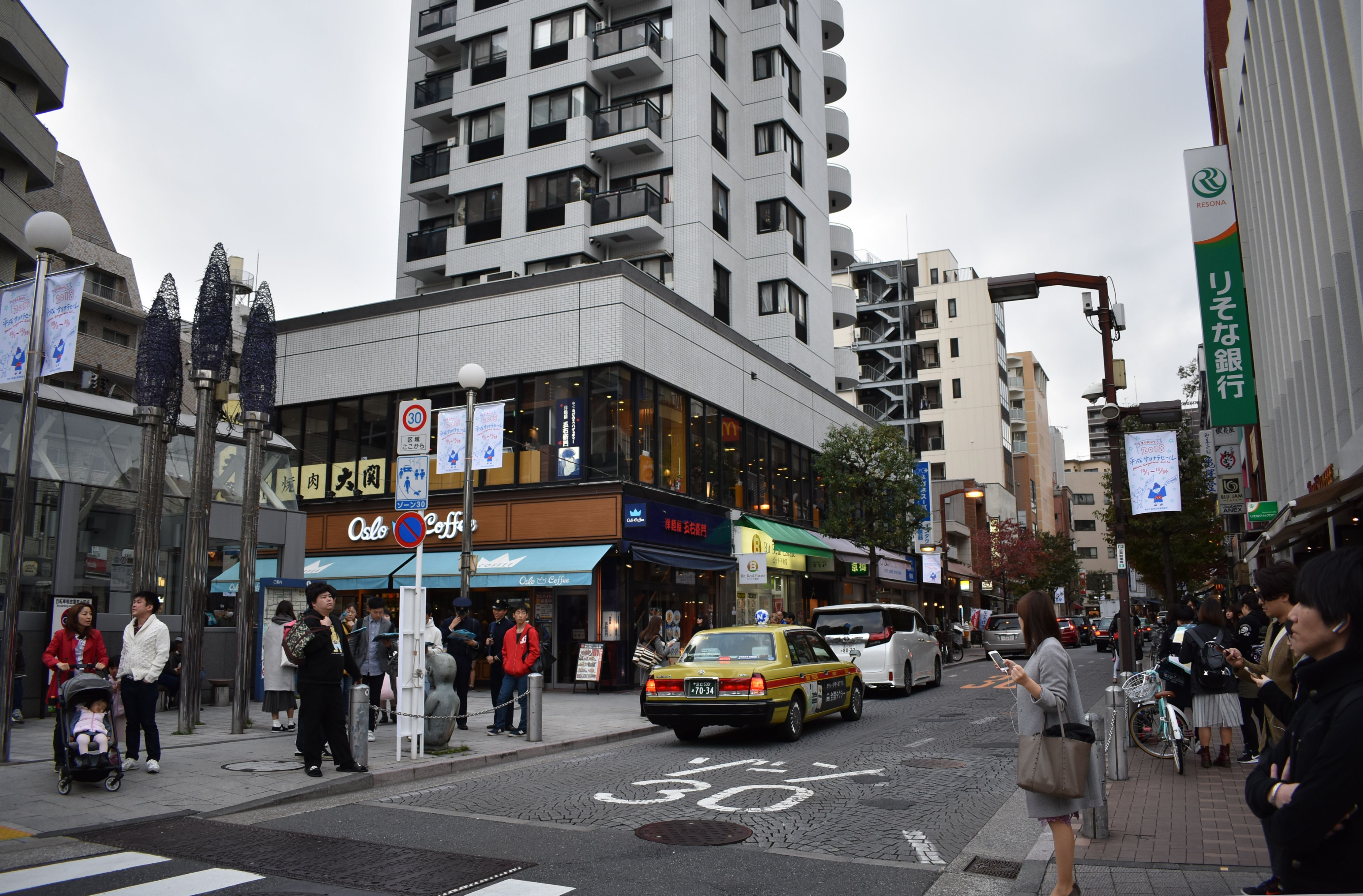 麻布十番商店街通り